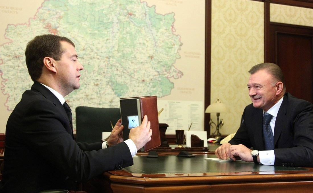 Олег Ковалев